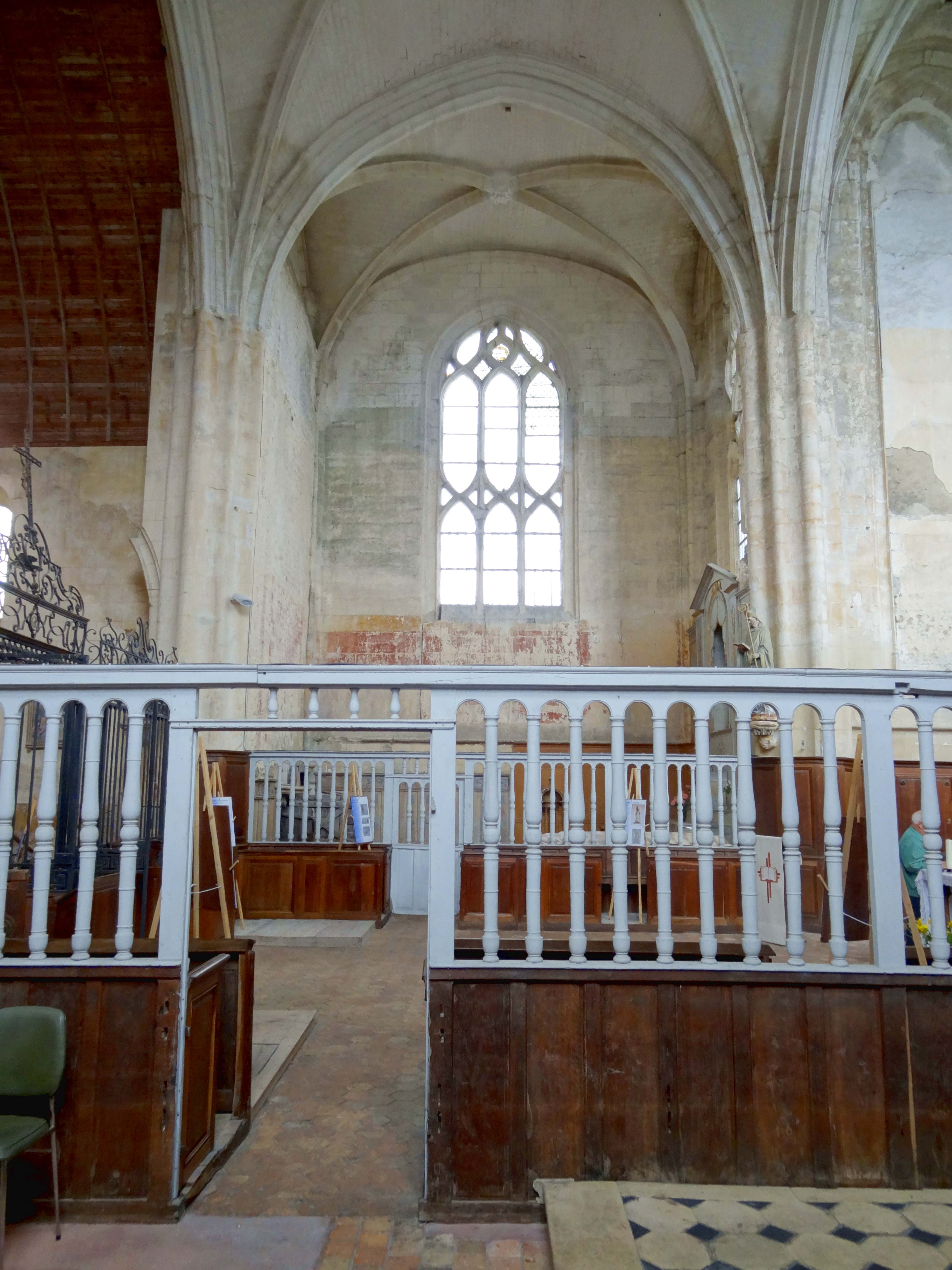 Intérieur de l'église - voir titre.